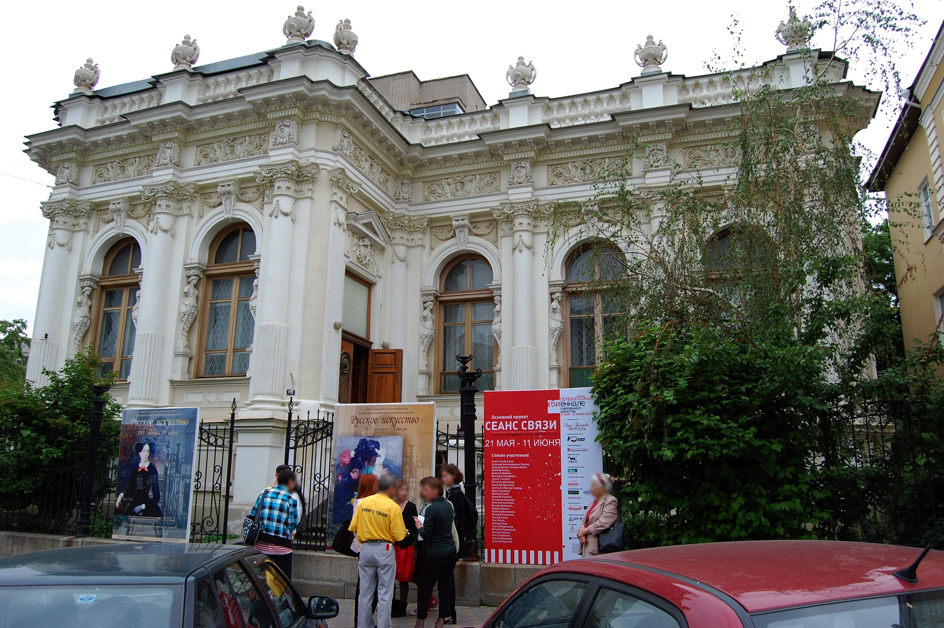 Biennale, Rostov-na-Donu, 2010